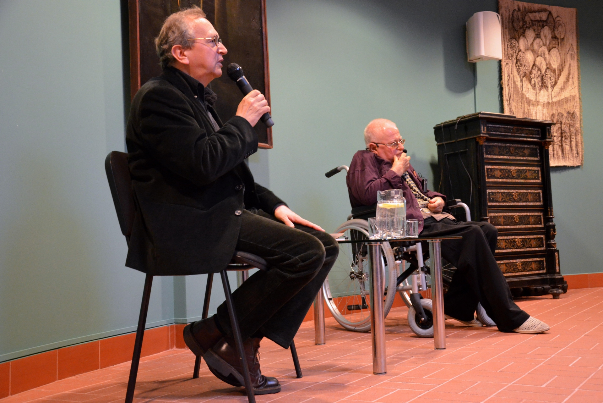 Prof. Bronisław Maj: Die Präsentation des Buches von Janusz Szuber "Tym razem wyraźnie" auf der Burg zu Sanok